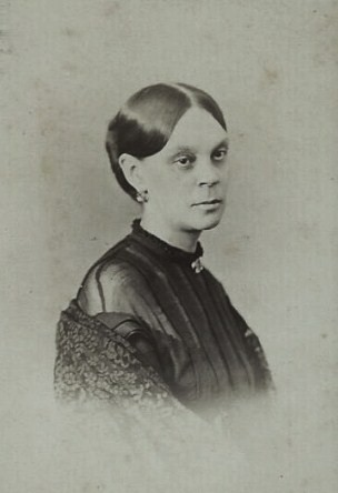 Ольга Николаевна Скобелева (1823-1880), урож. Полтавцева.